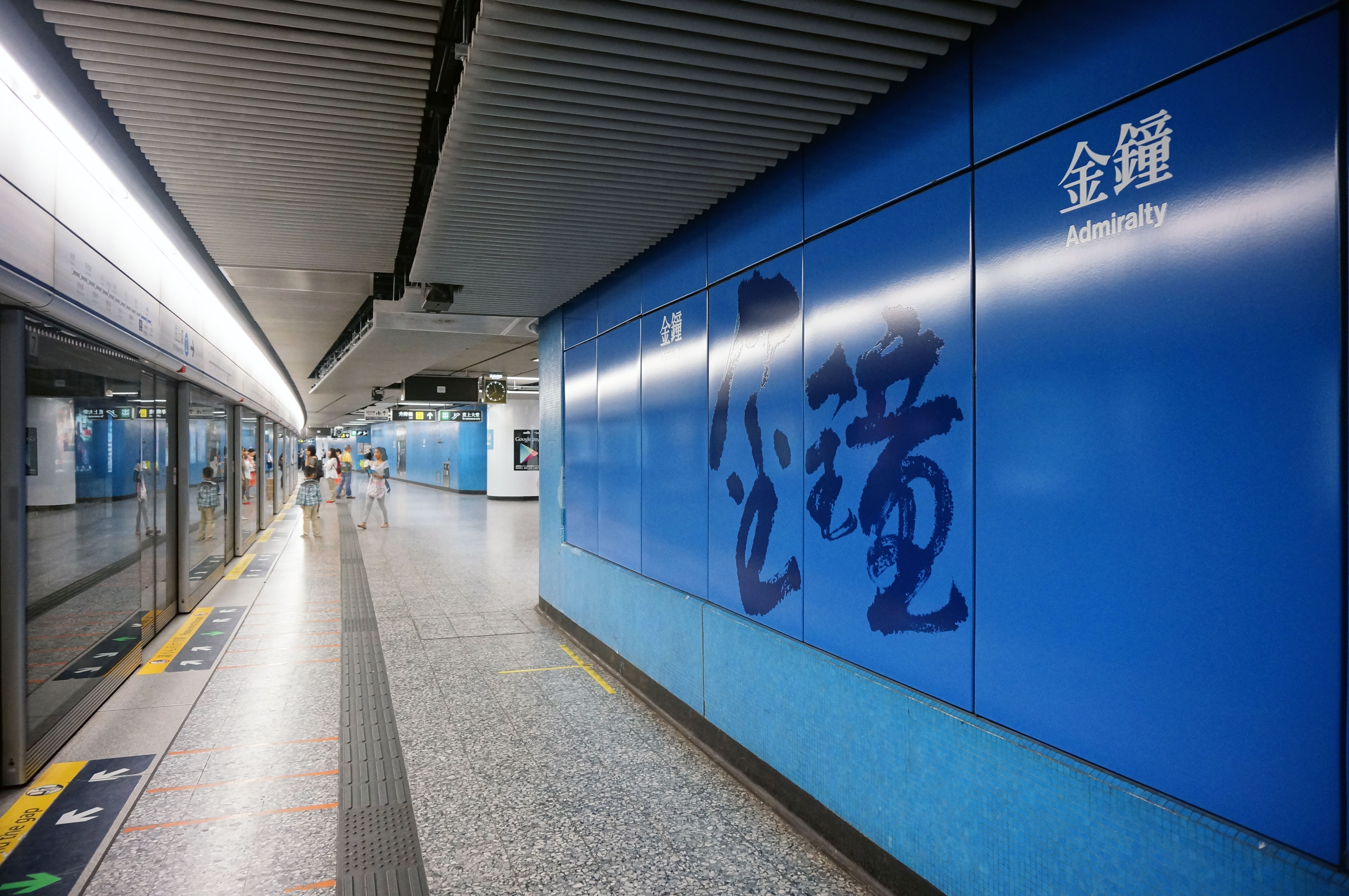 港鐵金鐘站月台